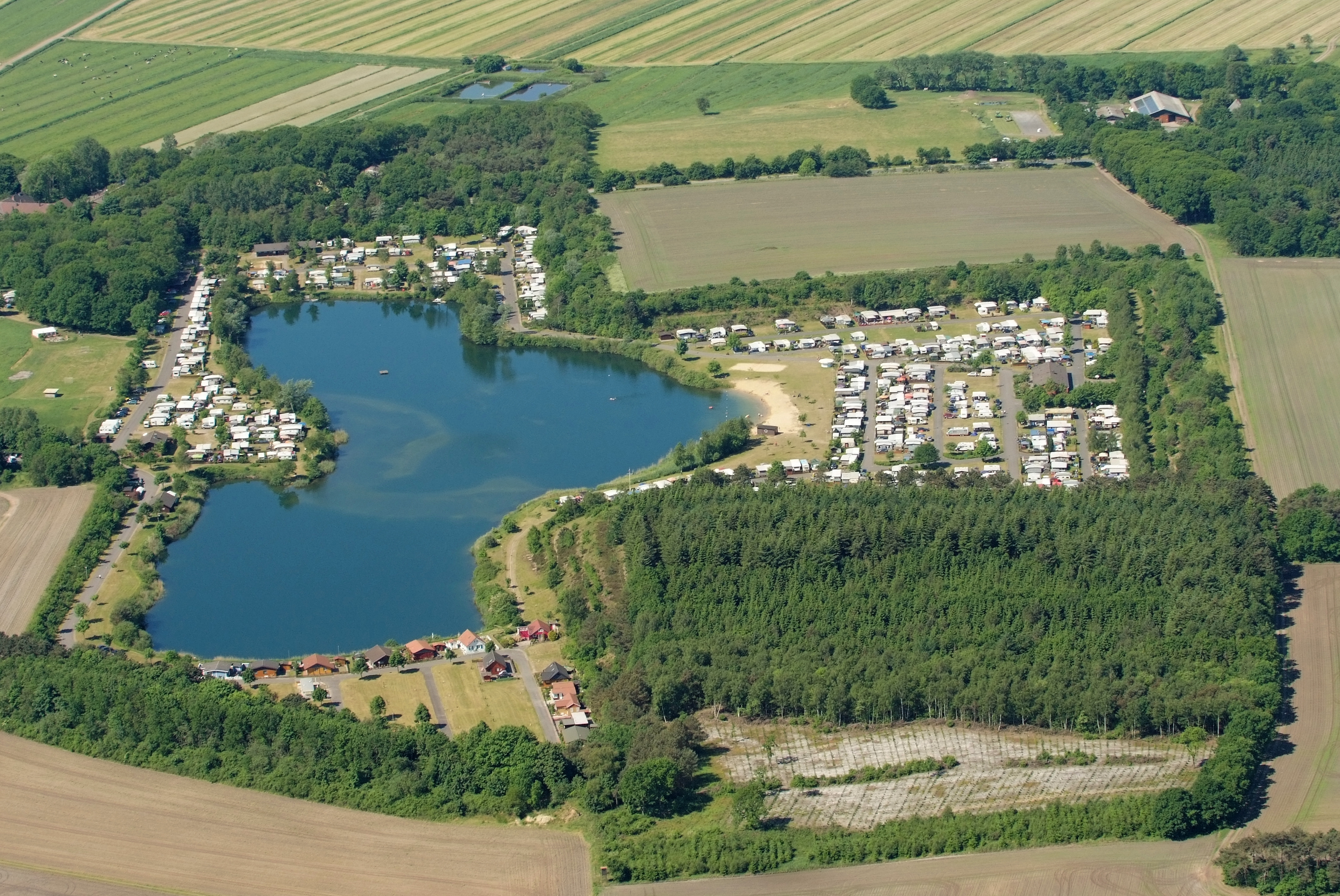 Kranzburger See bei Midlum (Land Wursten) / Cuxhaven Fotoflug vom Flugplatz Nordholz-Spieka über Cuxhaven und Wilhelmshaven